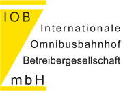 Logo Internationale Omnibusbahnhof Betreibergesellschaft